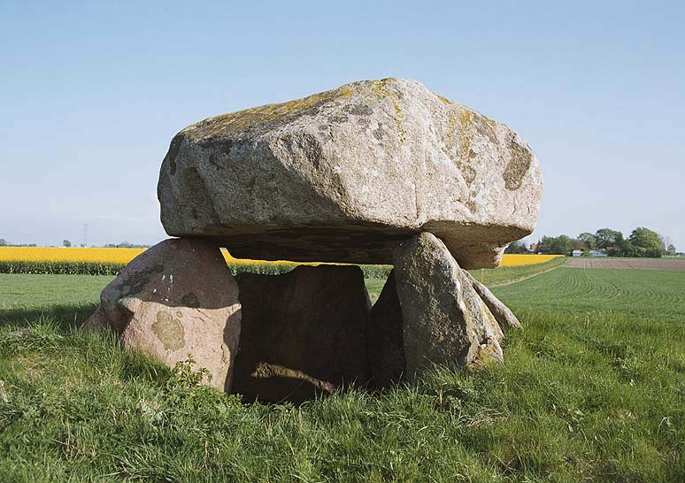 Dös i hög, RAÄ-nummer Södra Åkarp 2:1. Motiv: Södra Åkarp 2:1 Kategori: Stenkammargrav Dös i hög, RAÄ-nummer Södra Åkarp 2:1. Södra Åkarp 2:1.